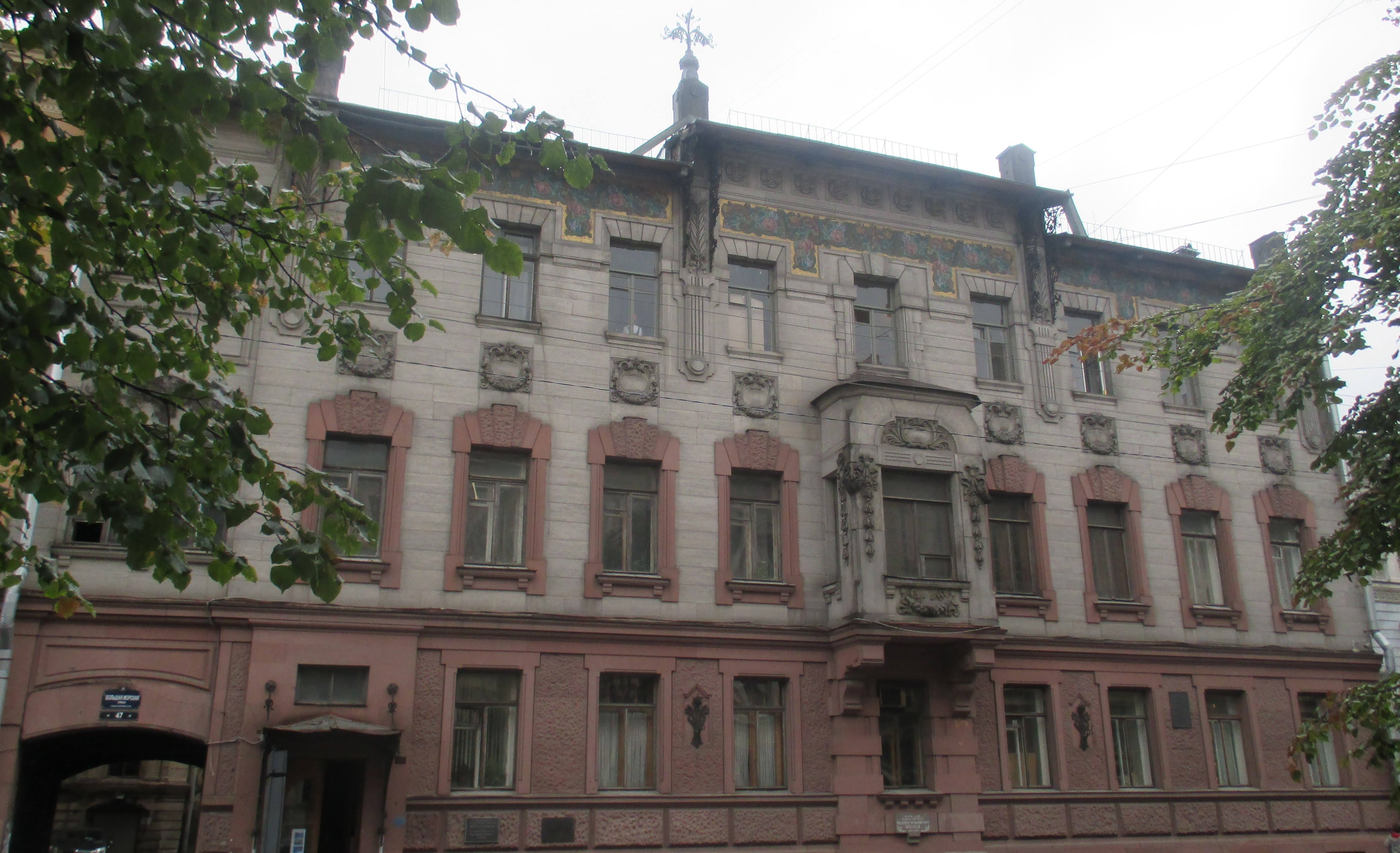 Ancien hôtel particulier de la famille de l'écrivain Nabokov avant la Révolution. Rue Bolchaïa Morskaïa, n° 47.